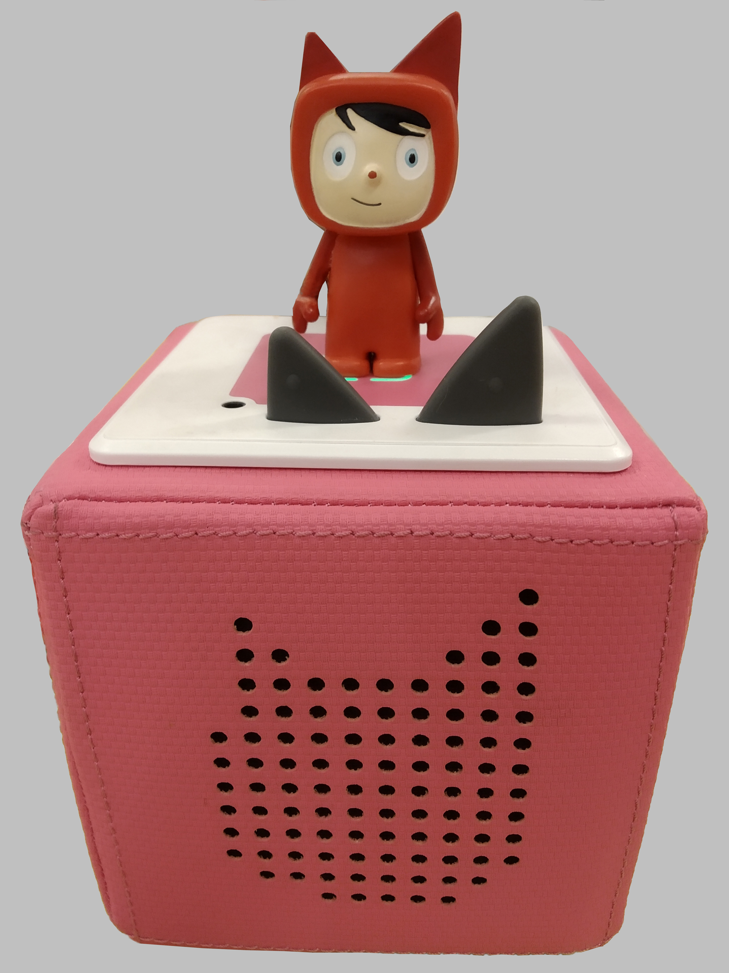 Toniebox ist ein von der Firma Boxine GmbH vertriebenes würfelförmiges Tonabspielgerät für Kinder, mit stark vereinfachter Bedienung.